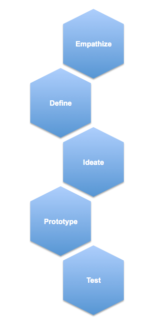 Processus de Design Thinking selon d.school